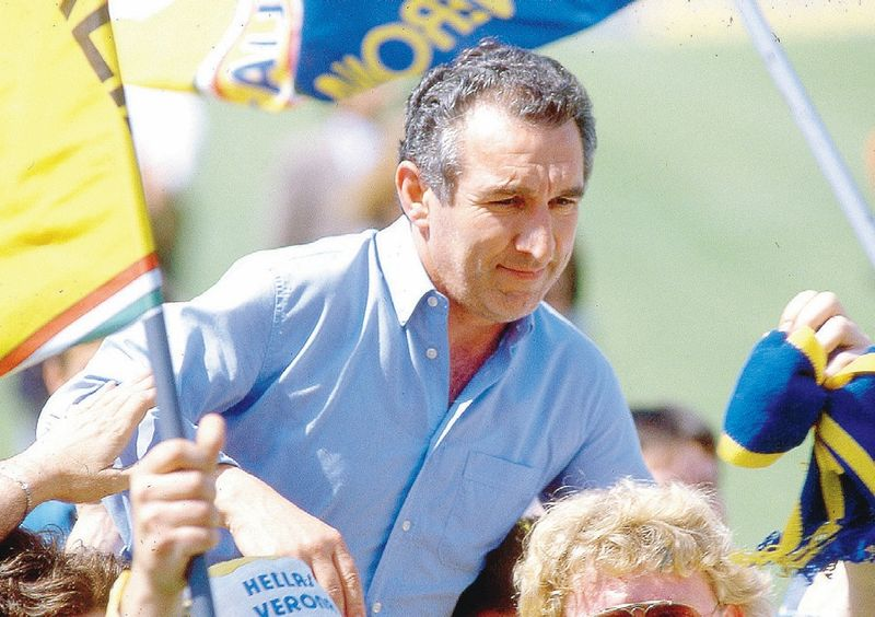 Osvaldo Bagnoli portato in trionfo dopo la conquista dello scudetto all'Hellas Verona